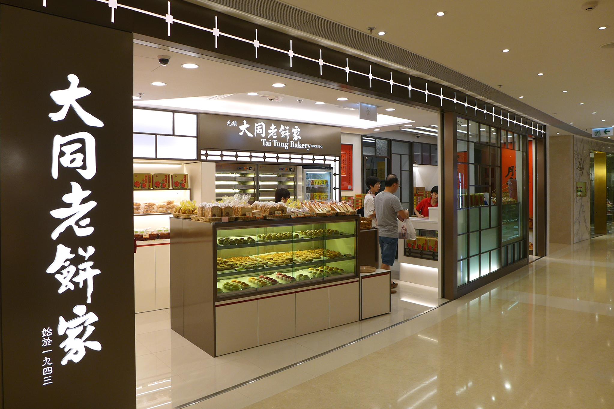 Tai Tung Bakery in Lee Tung Avenue